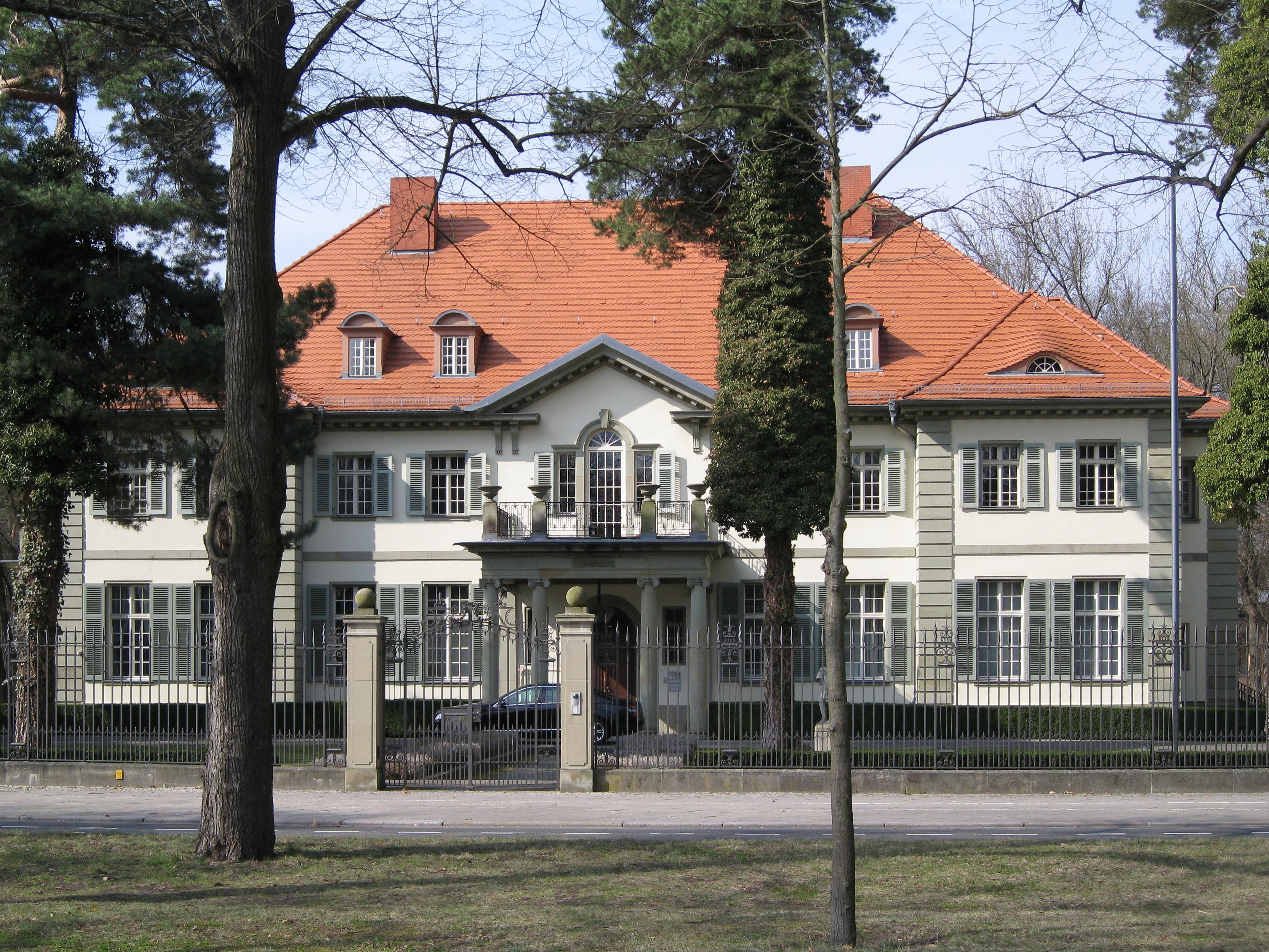 Villa mit Gärtnerhaus